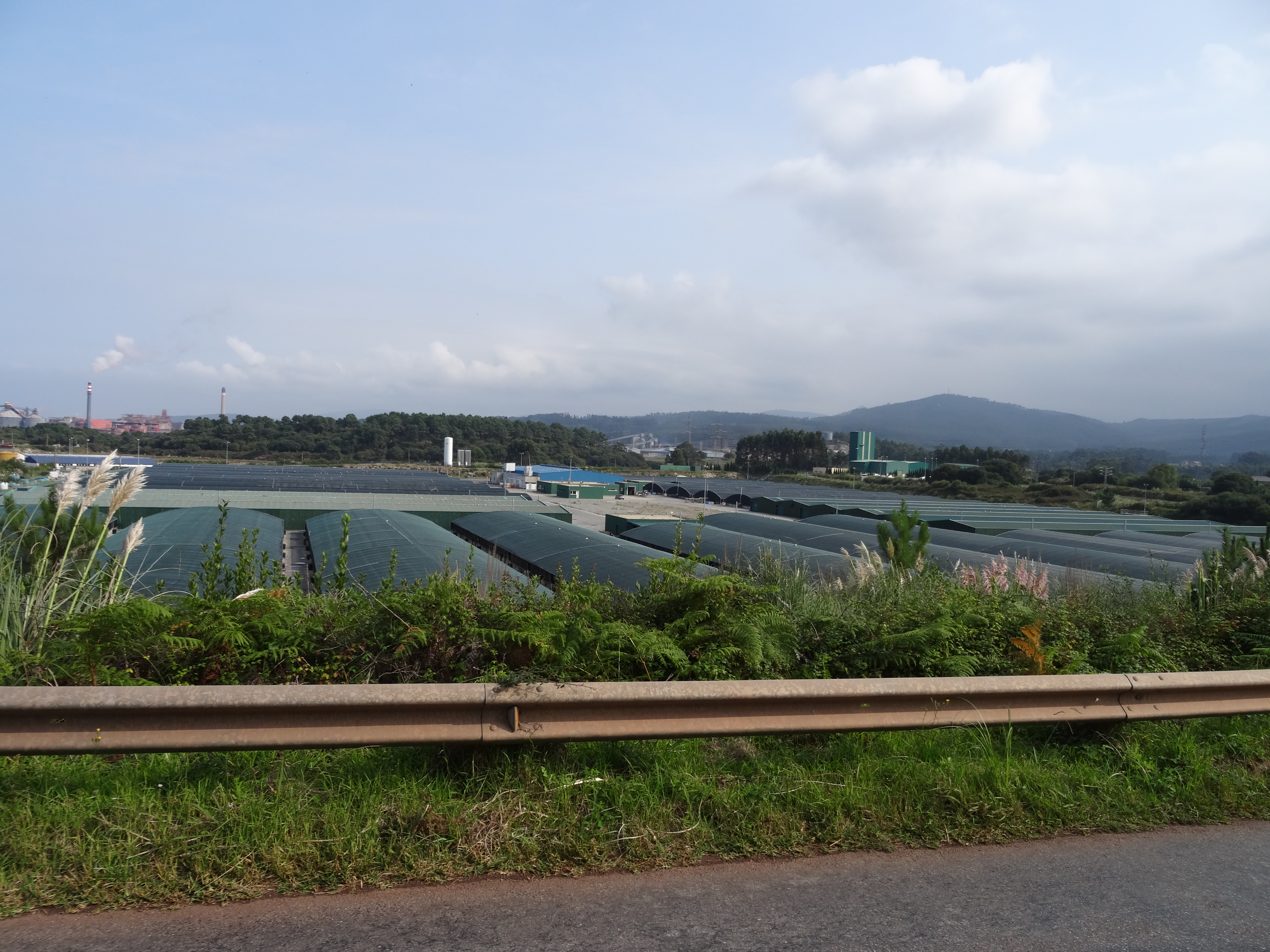 Ver título.